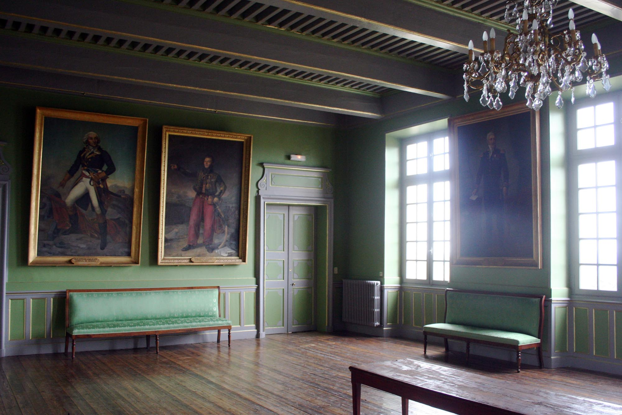 Salle des Illustres de l'hôtel de ville de Lectoure (Gers, Midi-Pyrénées, France).